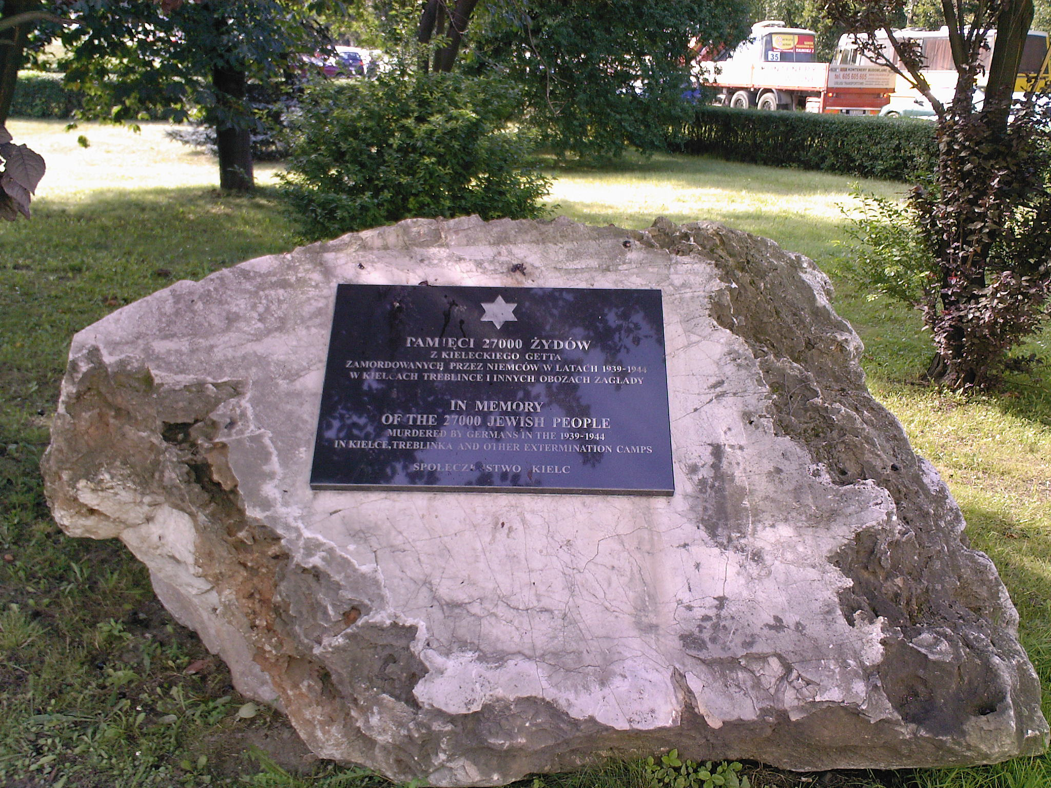 Głaz upamiętniający zagładę kieleckich Żydów